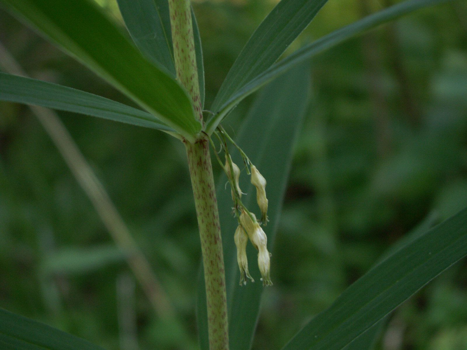 Polygonatum verticillatum, Lithuania